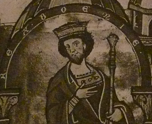 Přemysl Otakar I. v Žaltáři Heřmana Durynského